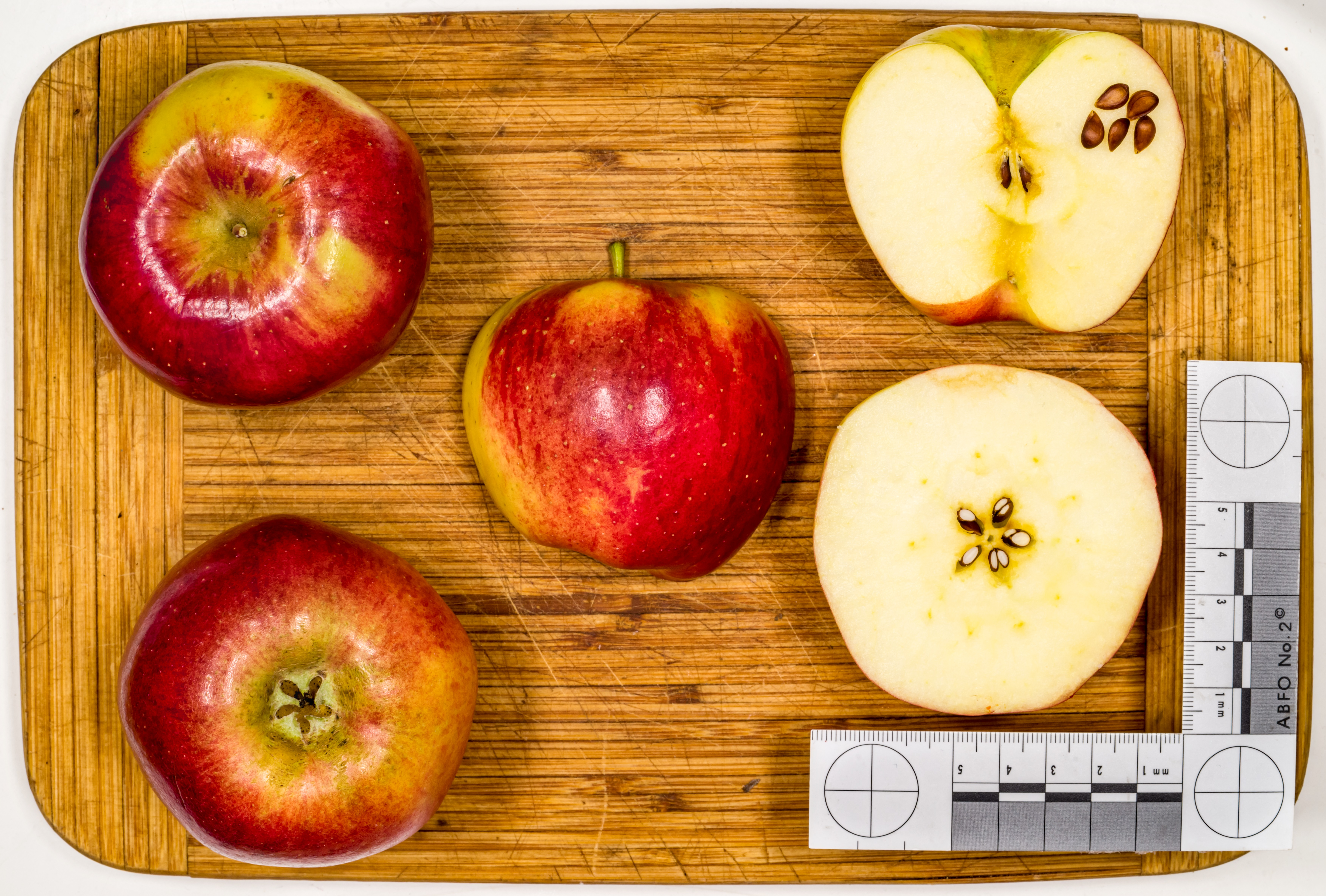 Apfelsorte: Ambrosia